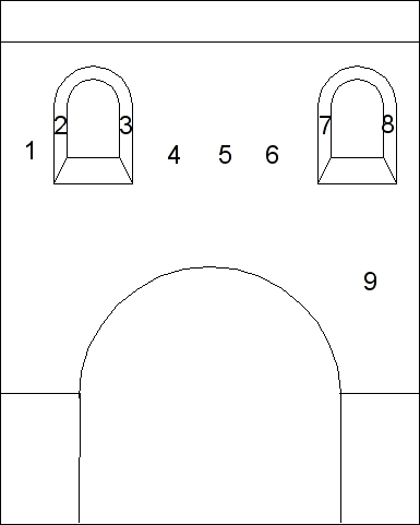 Disposition des fresques du mur est du chœur de l'église Saint-Martin de Vic